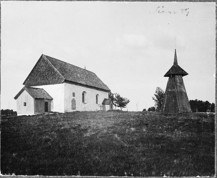 Kyrkan från sydväst med klockstapeln. Kategori: (01) ExteriörerKyrkan från sydväst med klockstapeln.